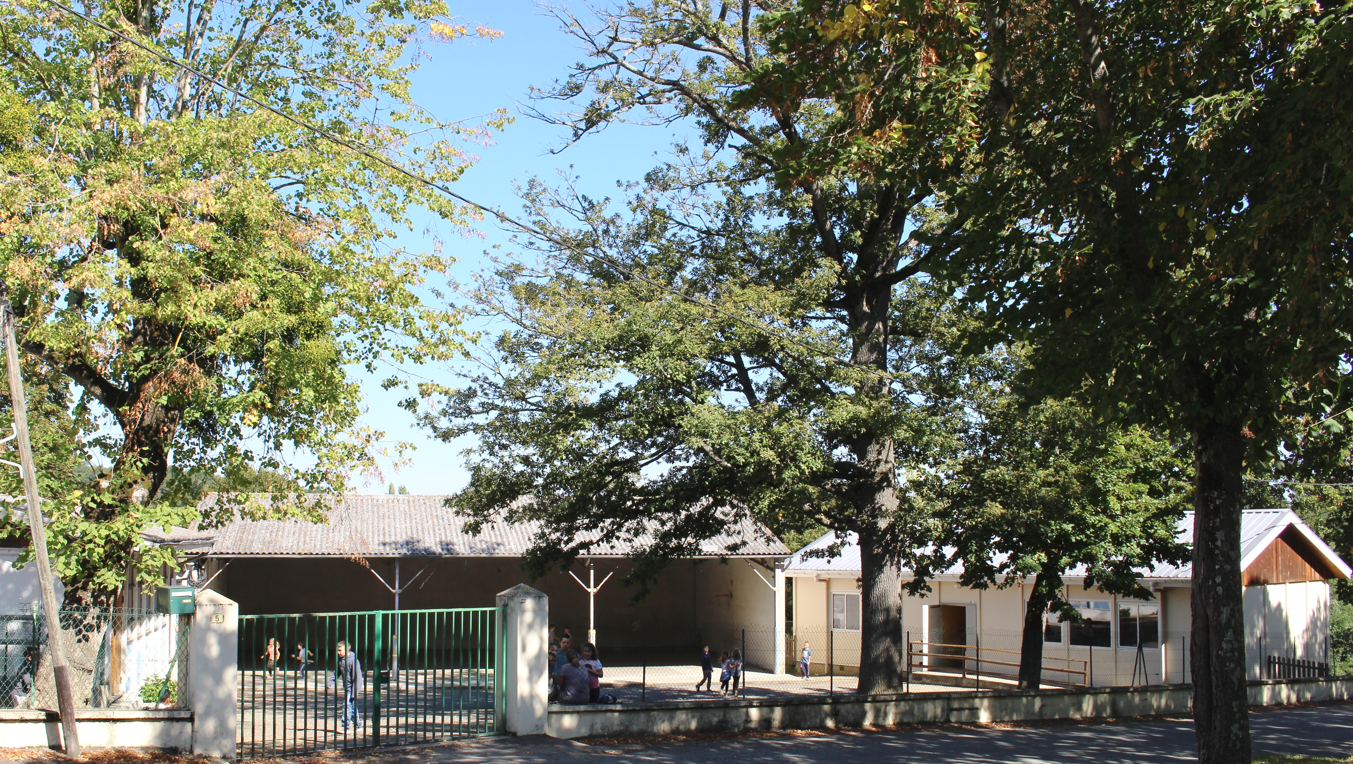 École de Lescurry (Hautes-Pyrénées)